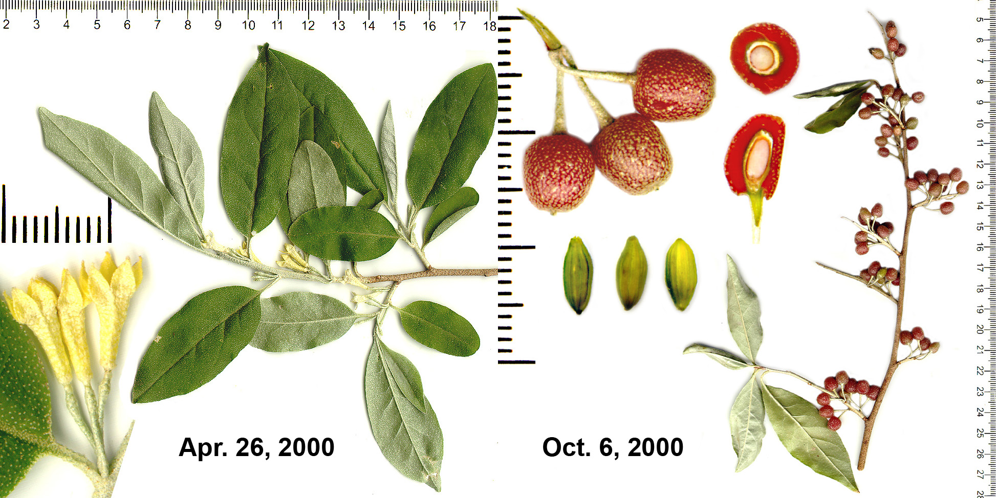 Elaeagnus umbelata leaves, flowers, fruits, and seeds (author: Mihailo Grbic)